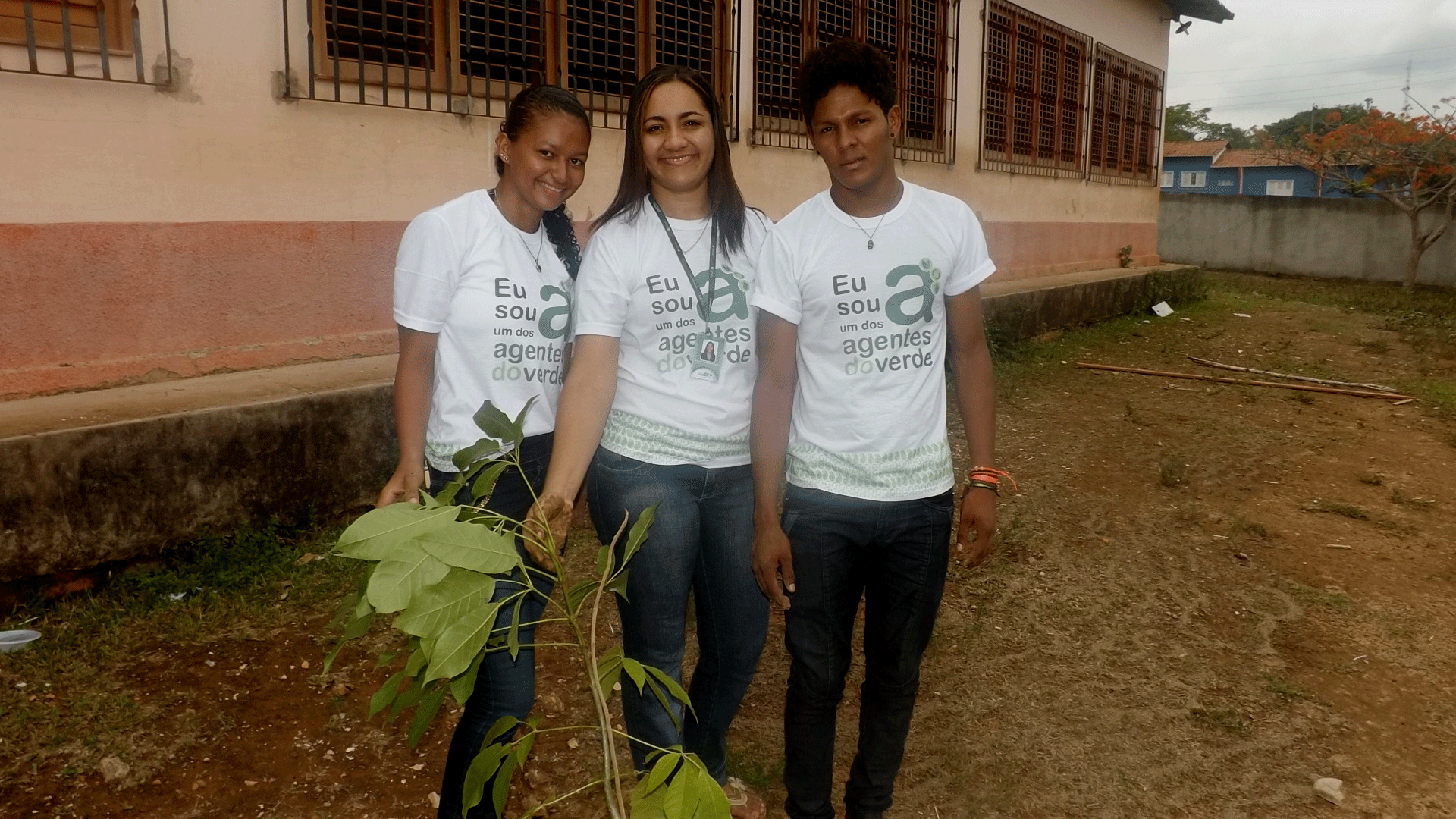 Foto tirada durante o lançamento do projeto no município de Pinheiro-MA. Na ocasião alunos do projeto plantaram uma muda de Ipê para simbolizar a implantação do projeto naquele município.